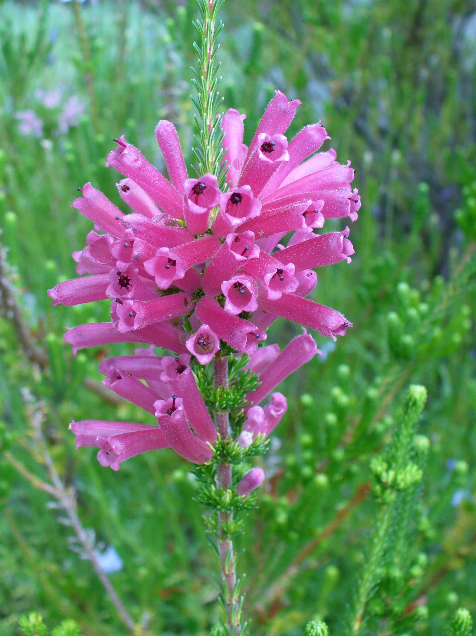 Eerica verticillata